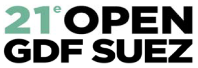 Logo der WTA Paris